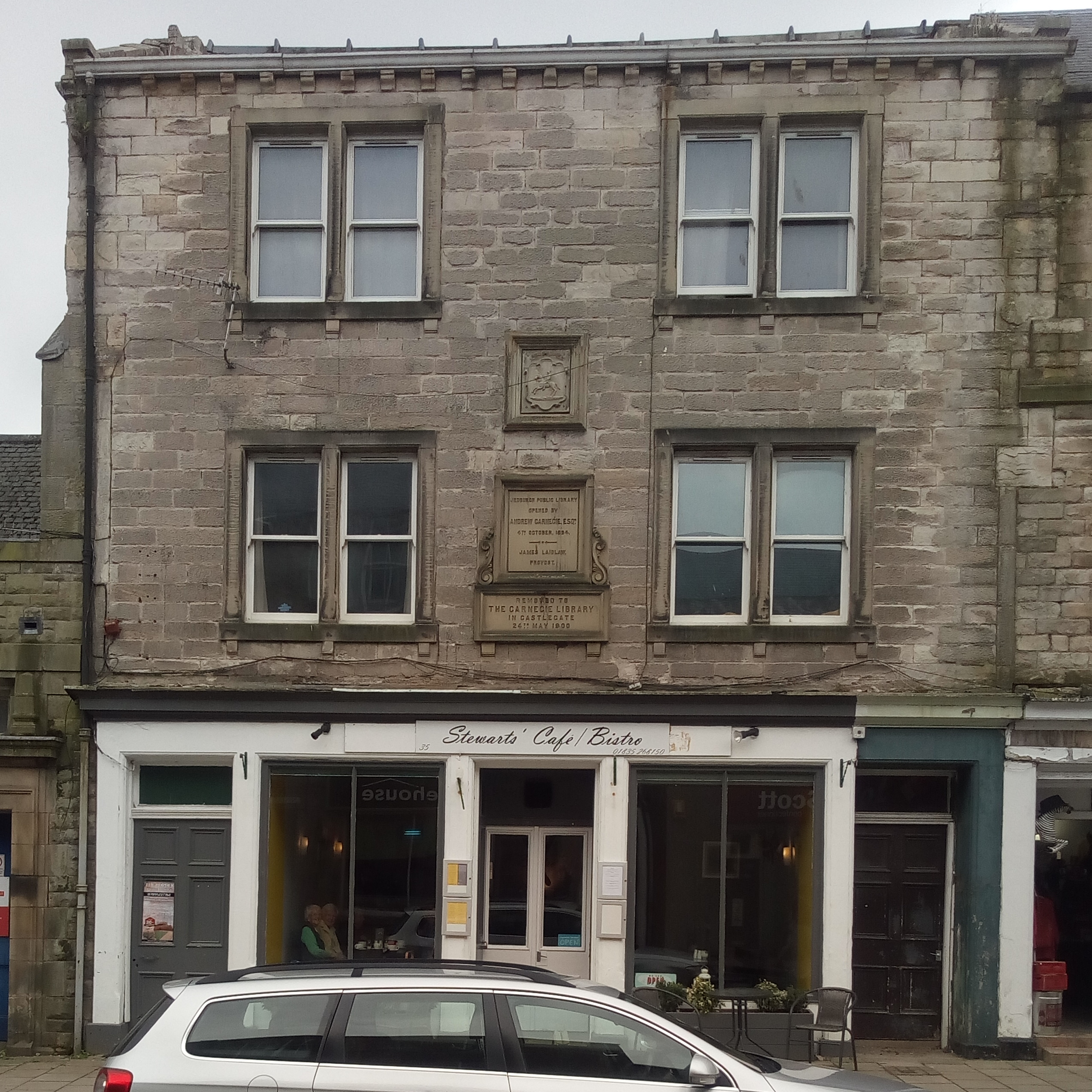 1884 library